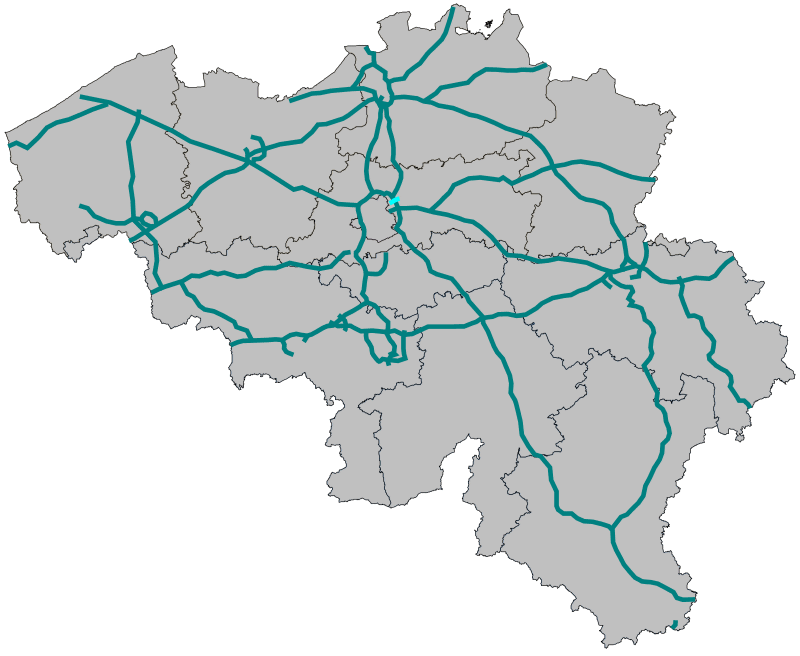 Traject A201 (België)